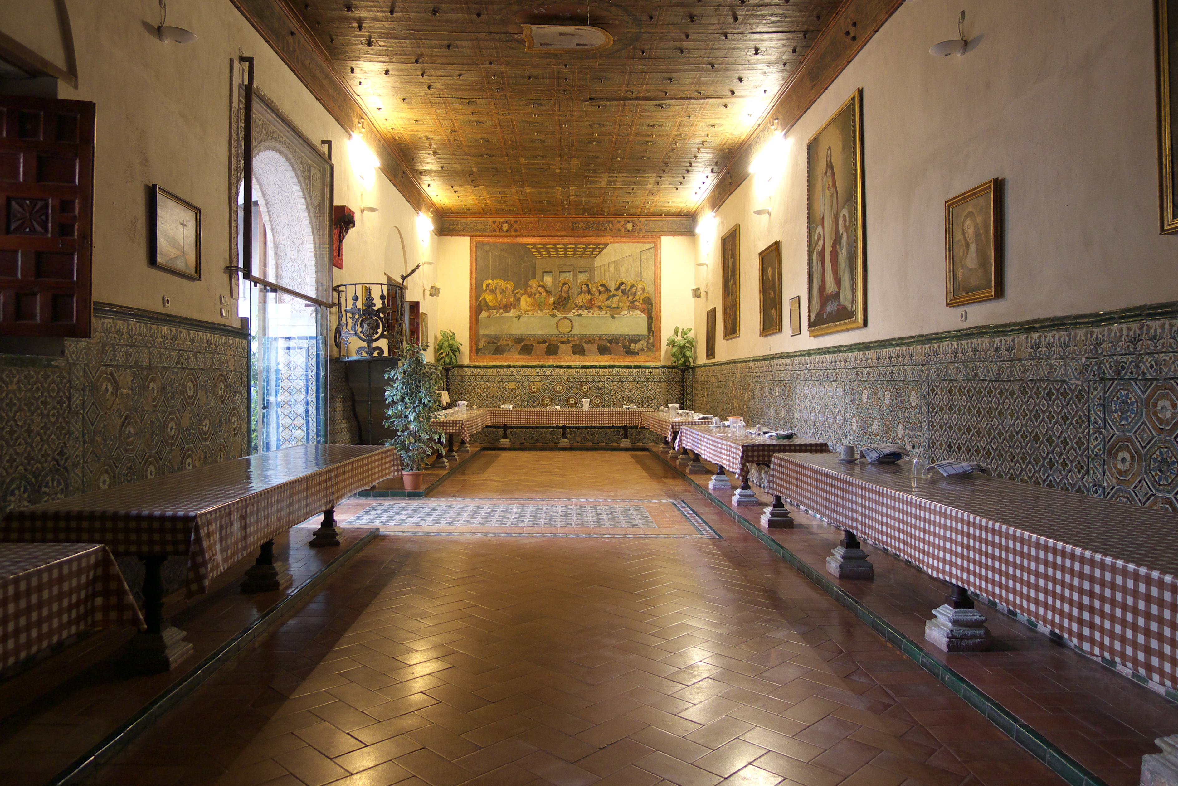 Es interesante el alfarje de madera. La pintura, representando "La última cena", destaca en la pintura renacentista sevillana. Datada entre 1545 y 1550, de autor desconocido, siendo abadesa dª Leonor Pacheco, se atribuye a pintor de la escuela de Alejo Fernández. Primera que toma el modelo de la pintada por Leonardo da Vinci.